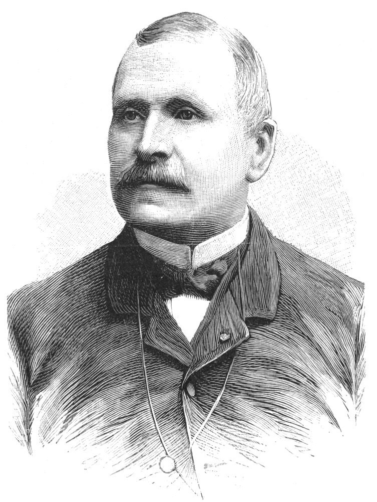 "M. Boulanger, ministre des colonies. - (Photographie Eug. Pirou.)".